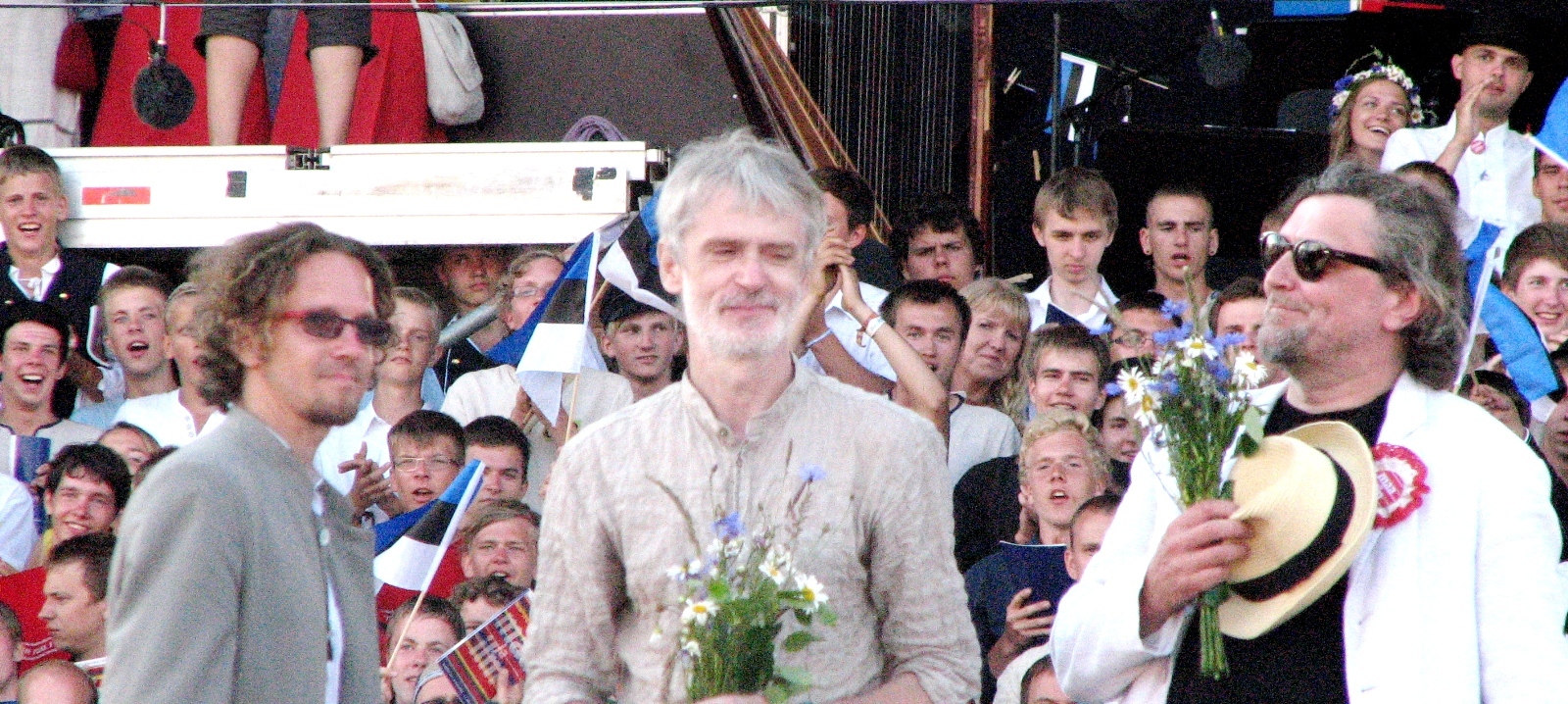 Siim Aimla, Villu Kangur ja Riho Sibul XI noorte laulu- ja tantsupeol pärast "Liivimaa pastoraali" esitust